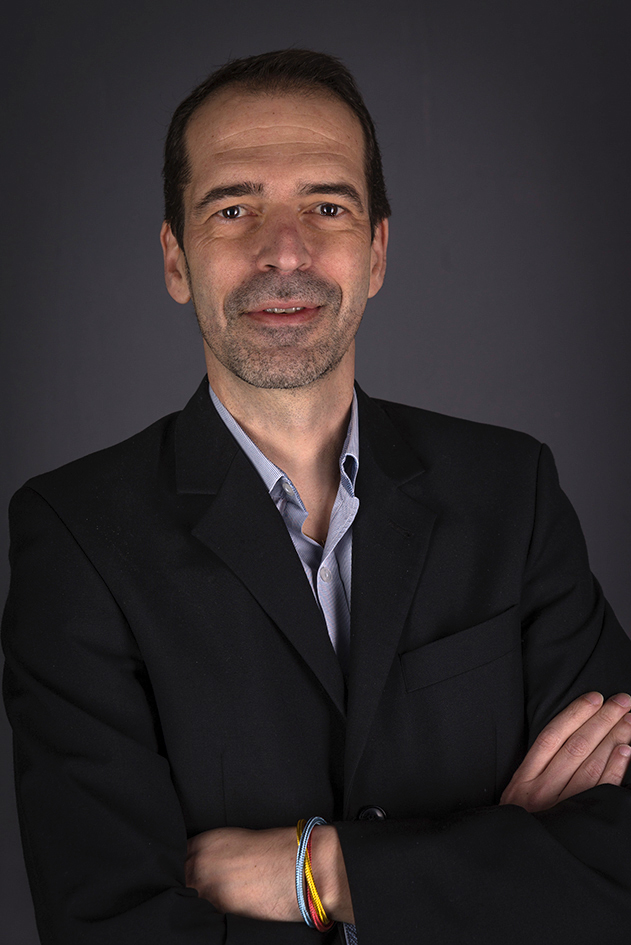 Portrait von Clemens Gull, Informatiker und Autor aus Österreich